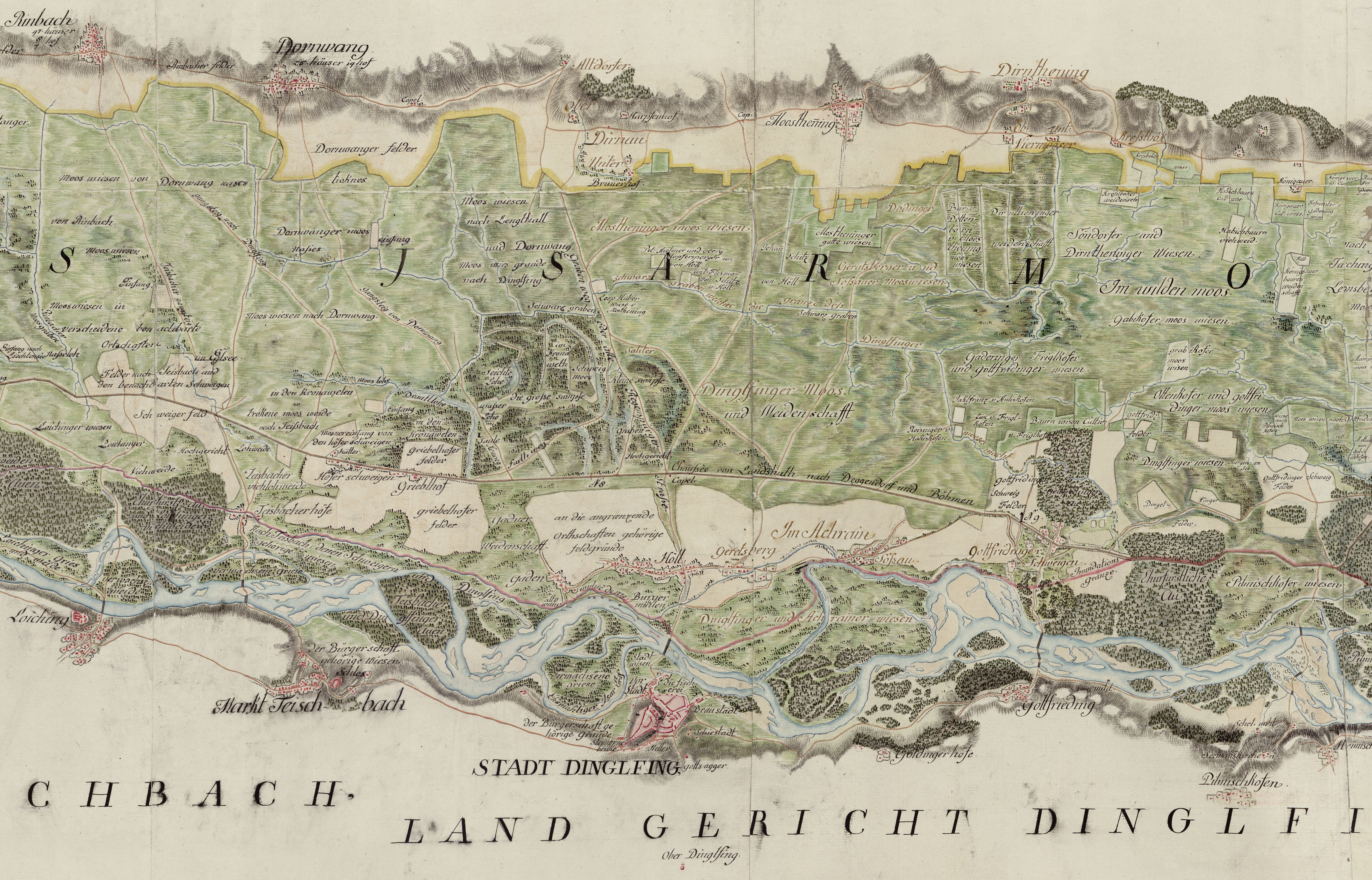 Karte von Dingolfing mit Isartal bei Dingolfing (nachkoloriert) Ausschnitt aus: Geometrische Plan über das Isar-Moos von Landshut bis Landau zwischen dem Isar-Fluss und denen Bergen von Altdorf bis zu dem Markt Pilsting nebst allen in diesem Moosdistrikt befindlichen Orthschafften, Flüssen, Gräben, Feldern, Hölzern, Cultivierten und uncultivierten Mooswiesen, Weidenschaften, Strassen, und Wegen, so alles in seinem Umfang nach der Besitzung eines jeden Ortes oder Gemeinde aufgenommen und bemessen worden an dem ganzen Isar Fluss in seiner wahren Lage und der roth angemerckten Inundationslinie welche die breitte angibt bey Hochwasser überschwemmt wird. Original: Bayerisches Hauptstaatsarchiv Plan Sig. 5766. Schönfeldstraße 5, 80539 München